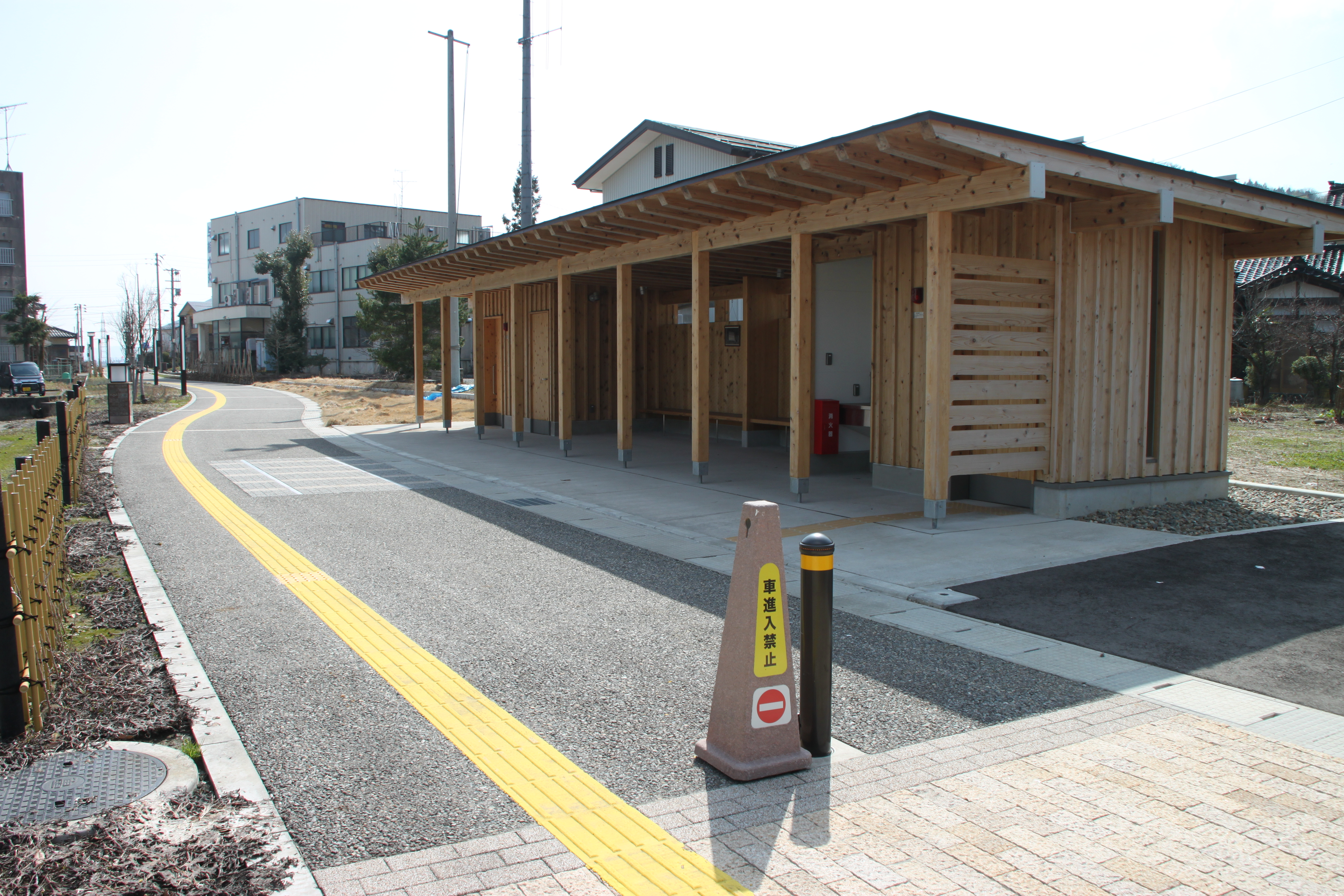 長岡鉄道上与板駅跡。休憩所となり、前の遊歩道にはレールが埋め込まれている。